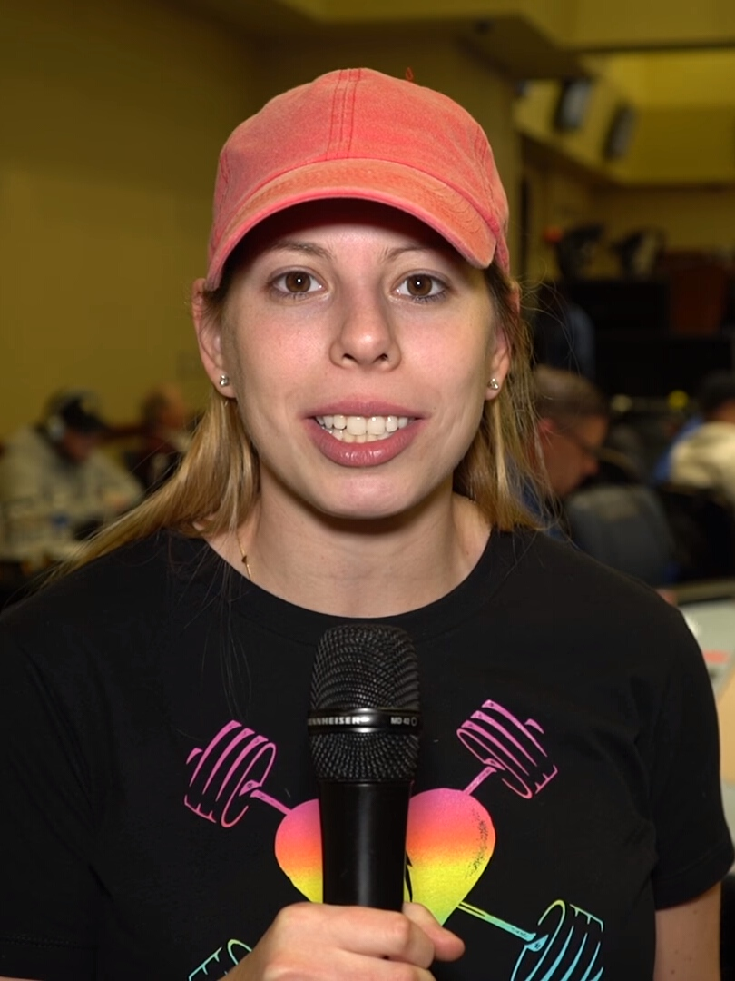 Loni Harwood beim WPTDeepStacks Jacksonville Main Event